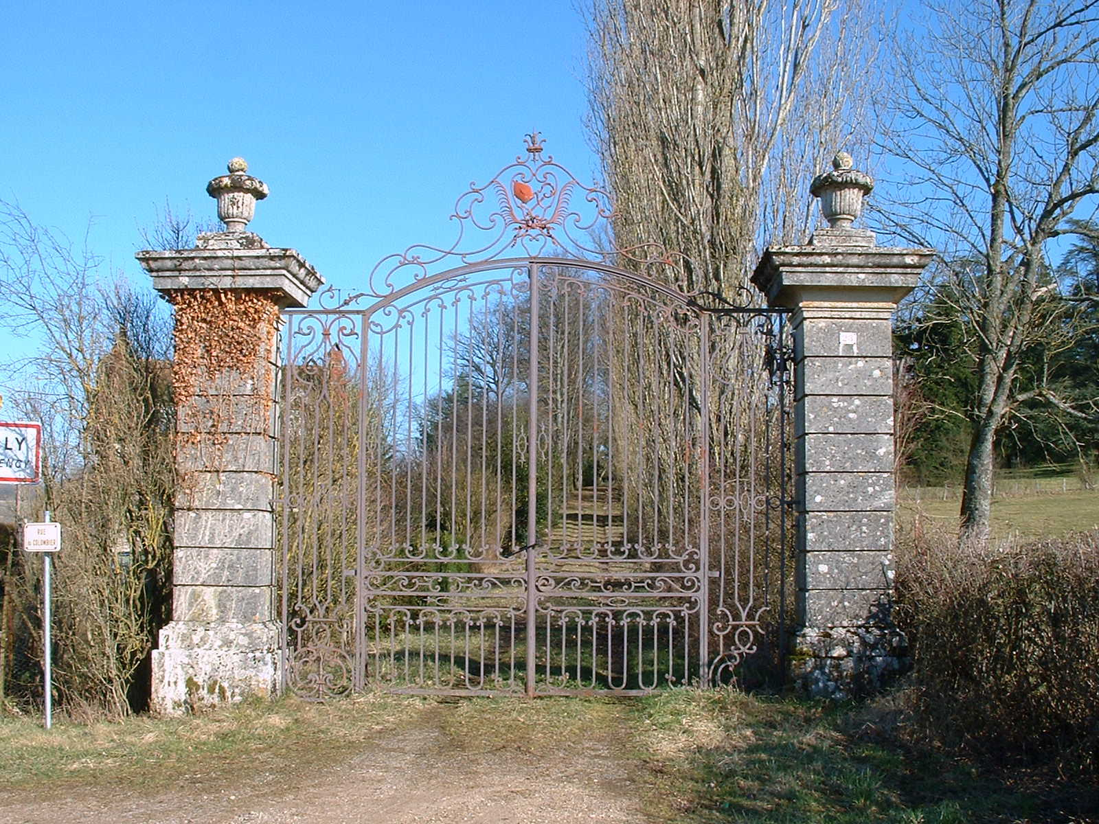 Provency (Yonne) : ancienne abbaye de Marcilly - le portail